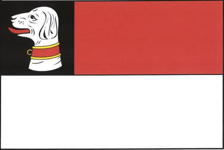 Nové Dvory, okres Kutná Hora, vlajka